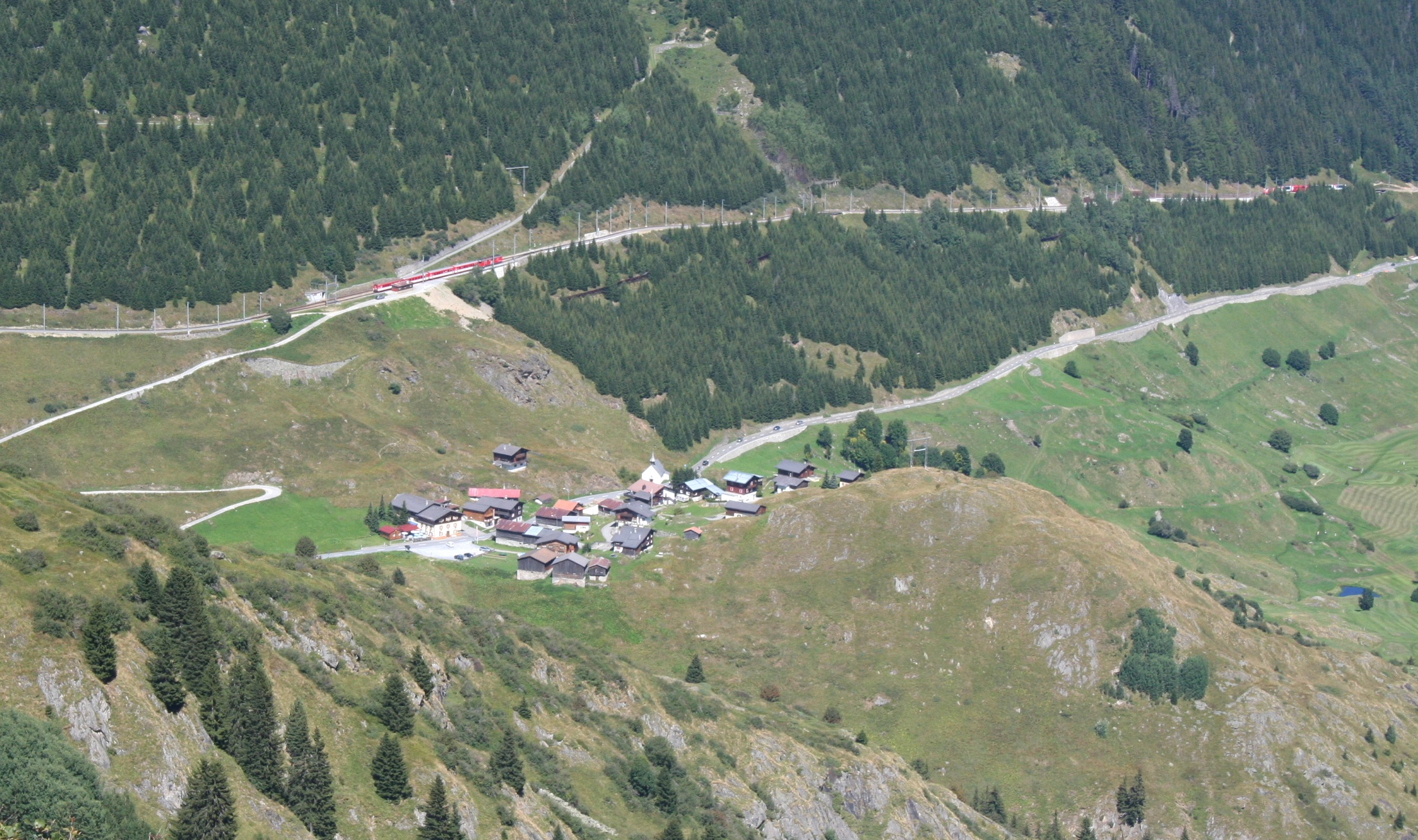 Tschamut